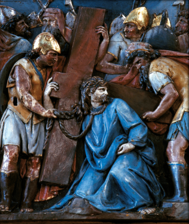 Andosillako elizako erretaularen xehetasuna